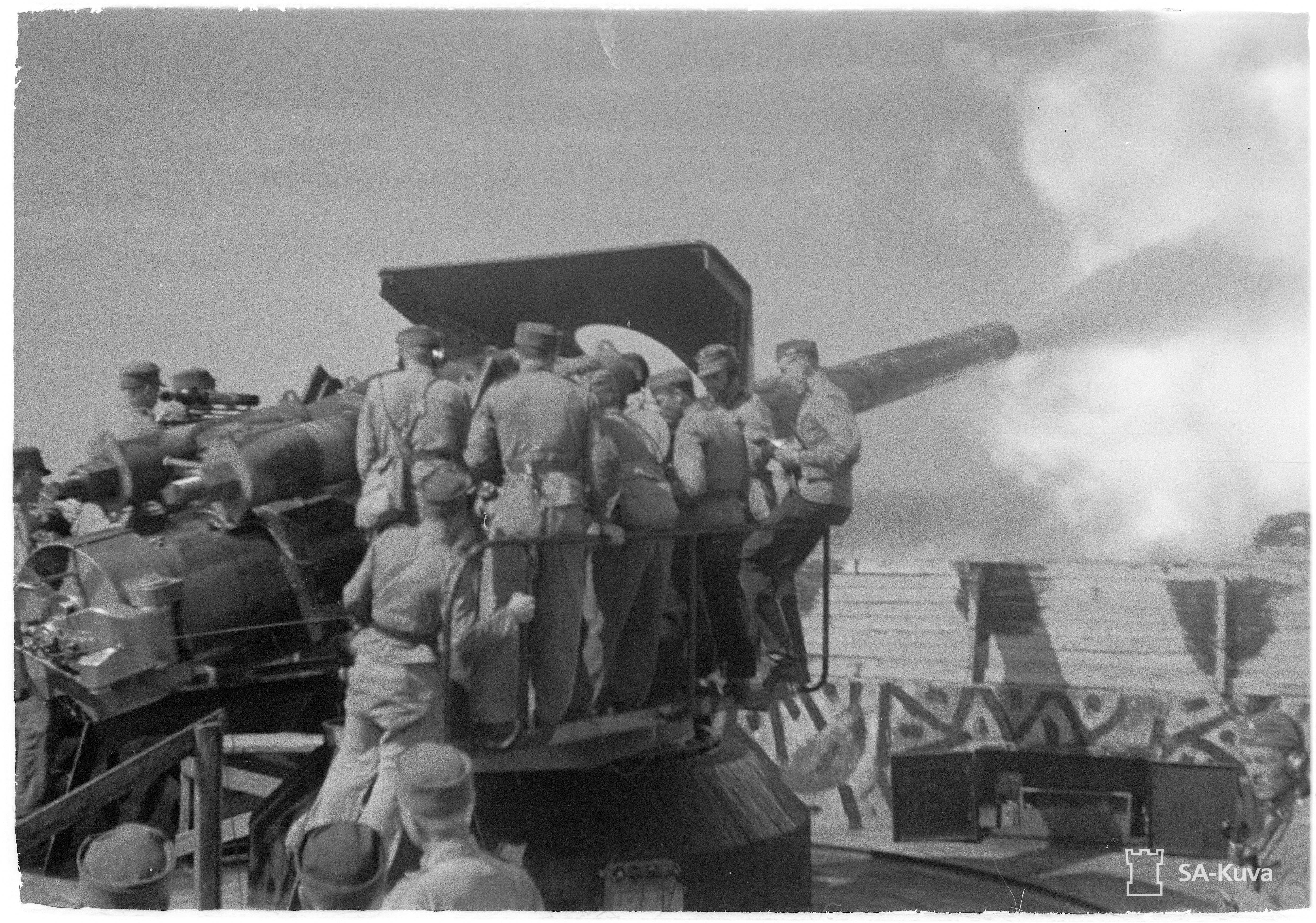 Raskas rannikkotykki on puhunut. (Kuvassa toinen Mäkiluodon kahdeksantuumainen rannikkotykki, 203/45 C tai 203/50 VC). Kuvauspaikka: Mäkiluoto.